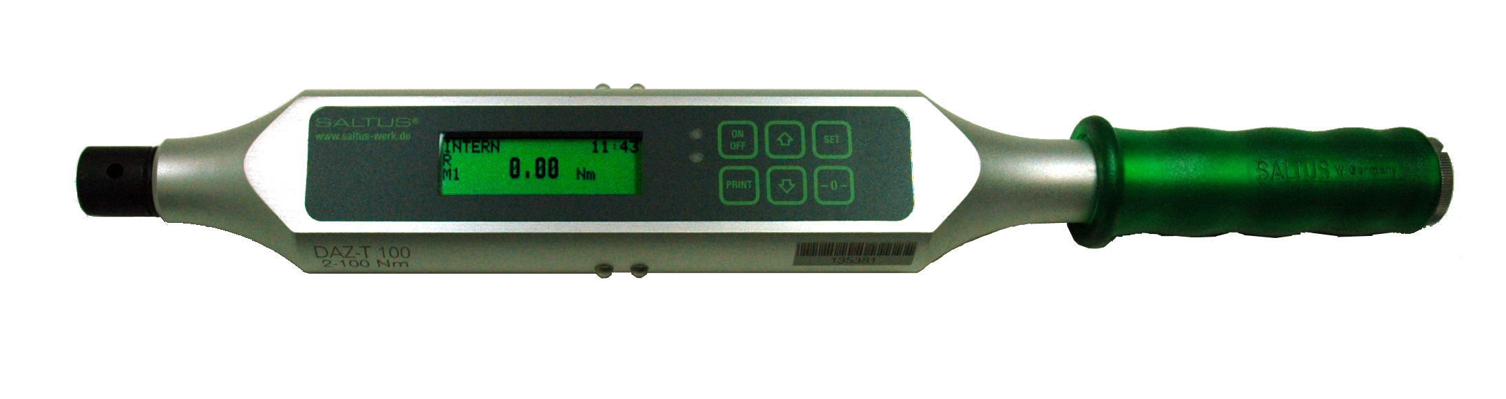 programmierbarer elektronischer Drehmomentschluessel